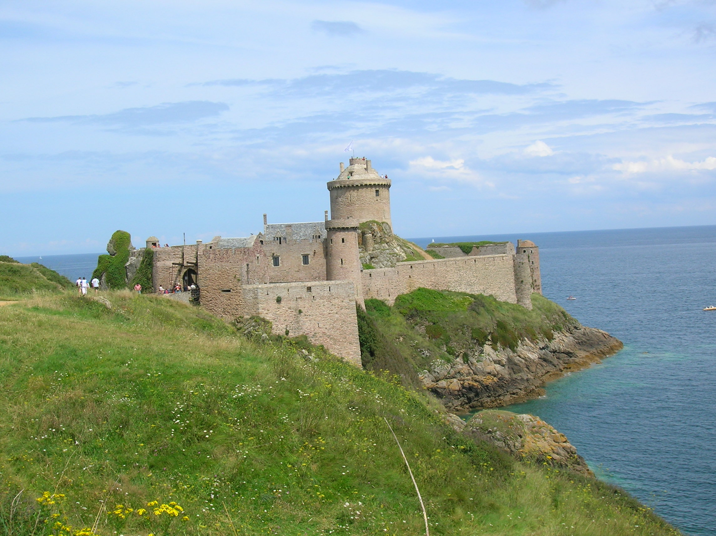 Fort La Latte, Côtes d'Armor, France